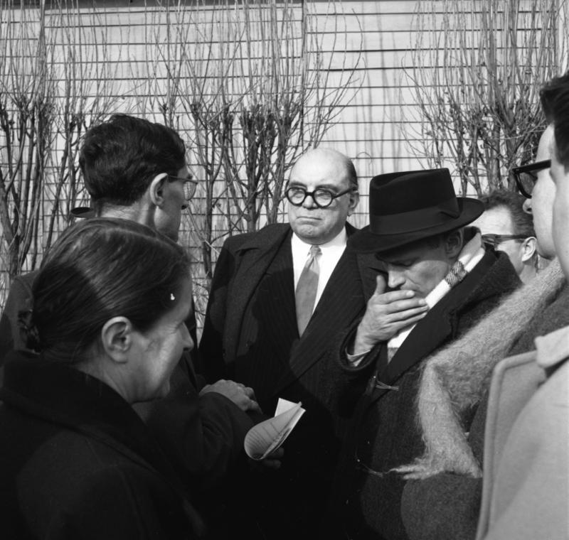 Ankunft der Wissenschaftler aus Sochumi brit. Journalist Sefton Delmer im Gespräch 12. Februar - 16. Februar 1958